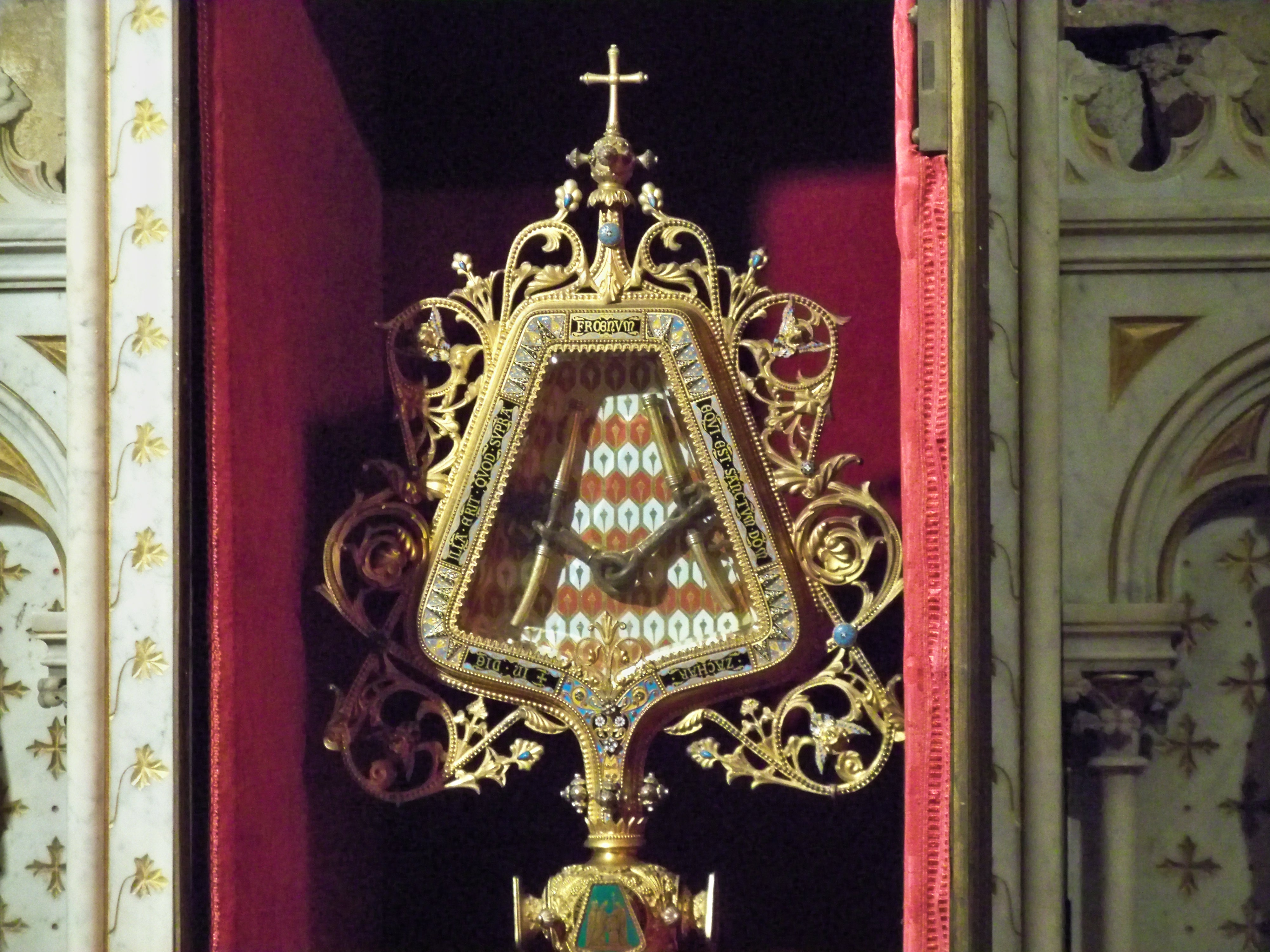 Chasse du Saint Mors de la Cathédrale de Saint Siffrein (84)